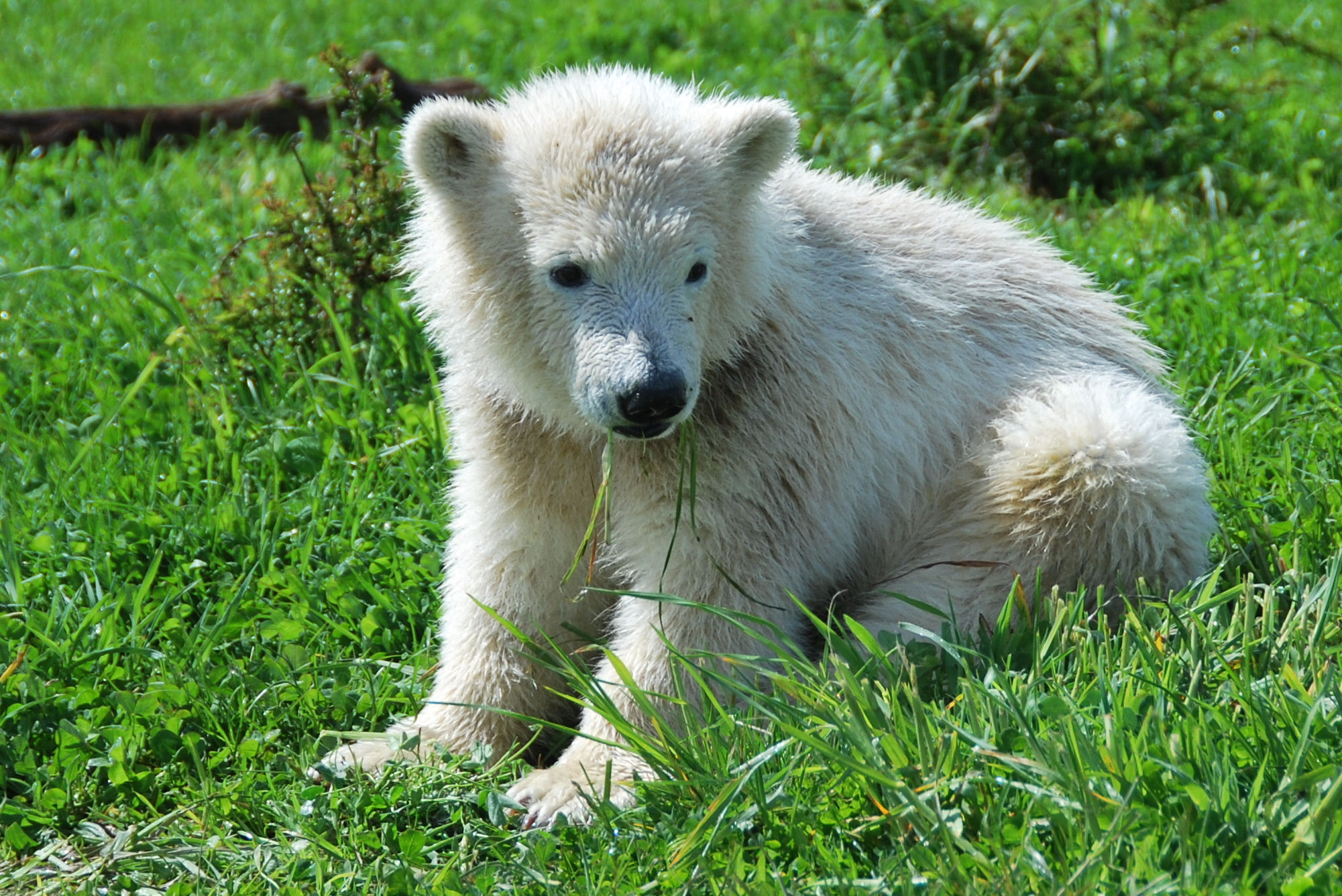 Isbjørneungen Siku fra Skandinavisk Dyrepark. Den er født den 22. november 2011. På billedet vejer den 34 kilo.